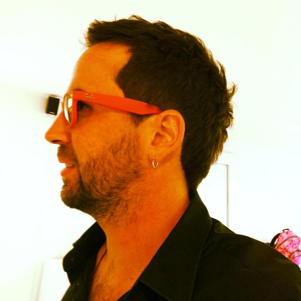 Foto Del Nuevo look De lucas arnau del 2011